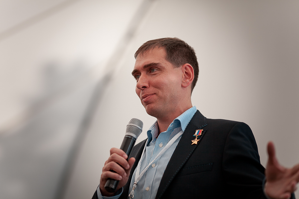 Сергей Александрович Волков, космонавт, герой России. Лекция на Geek Picnic 2013.